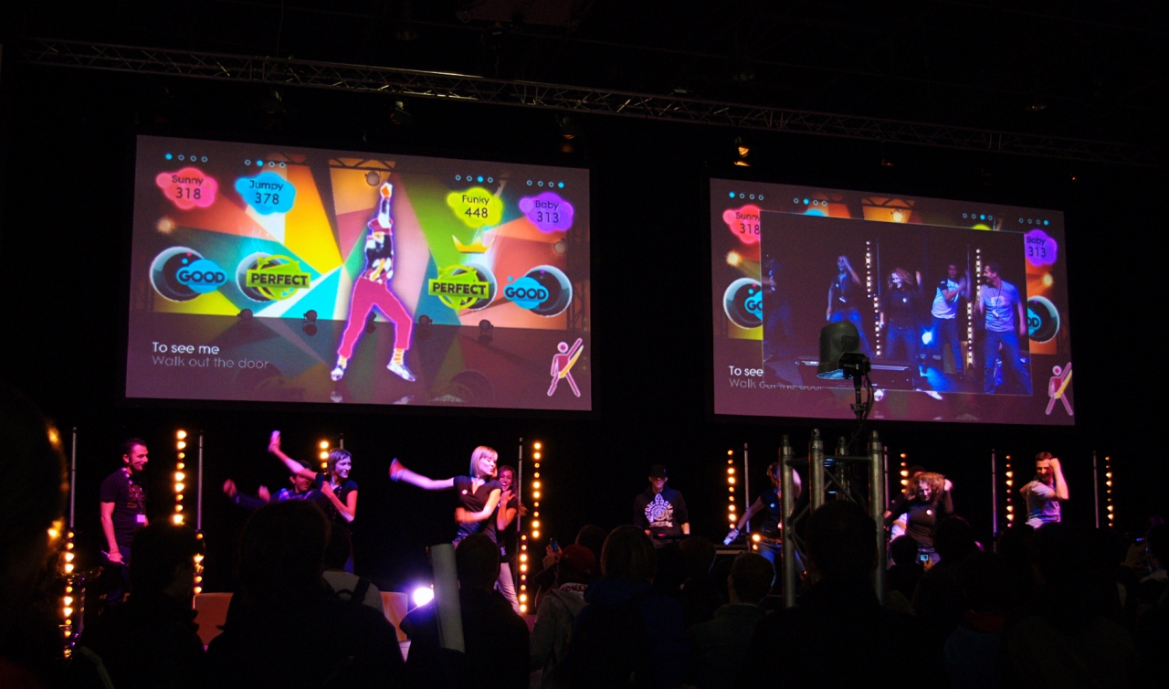 Paris Games Week 2010